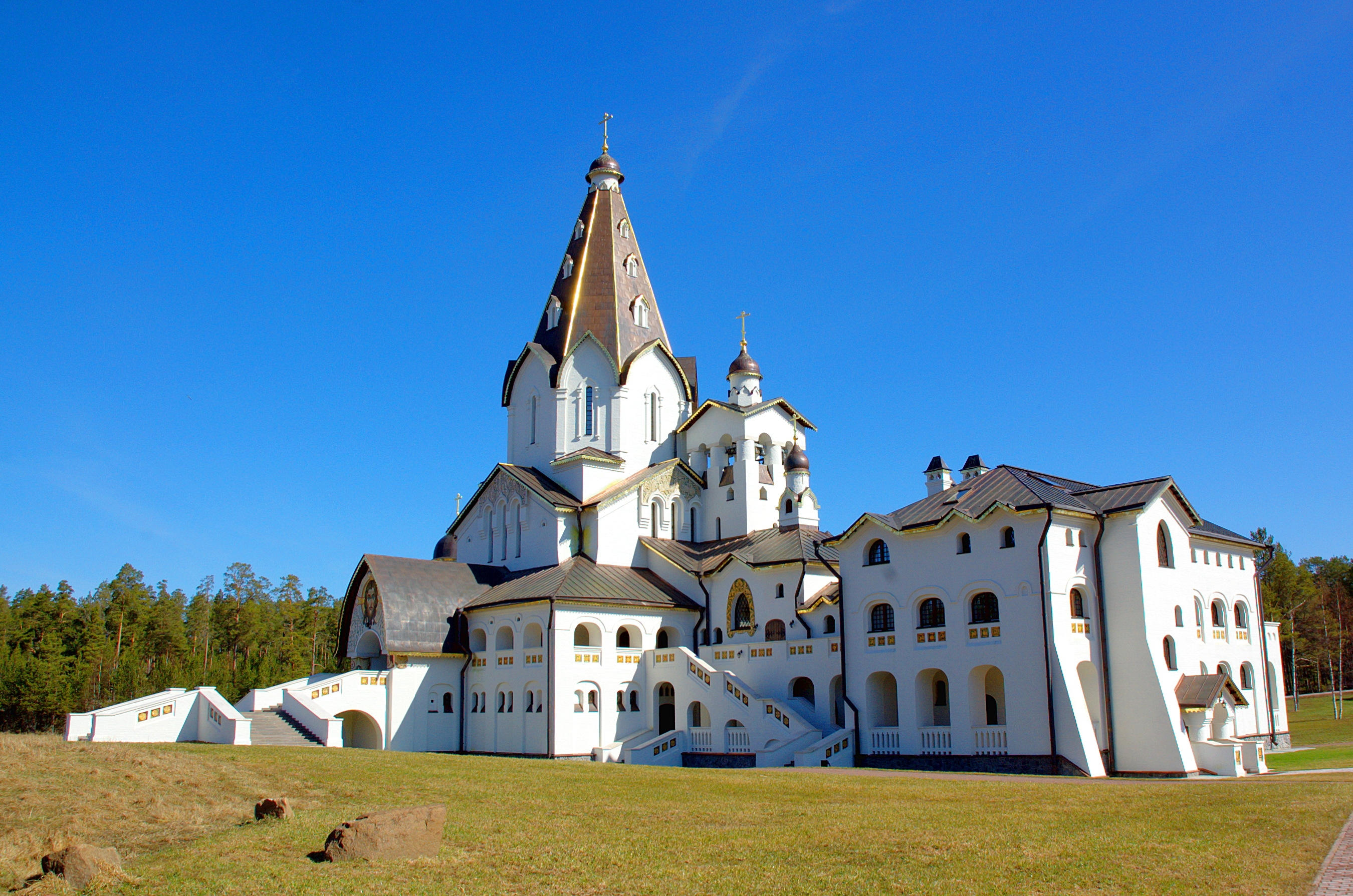 Авторы архитектурного проекта: Мастерские Андрея Анисимова, архитекторы А. Анисимов, Т. Ефимова, конструктор В. Райберг, художники А. Брусов, А. Верди.